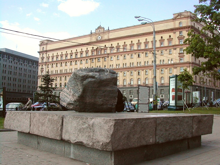 Plac Lubiański w Moskwie. Pomnik-kamień ofiar represji. W tle budynek Łubianki. 30 maja 2003 r.